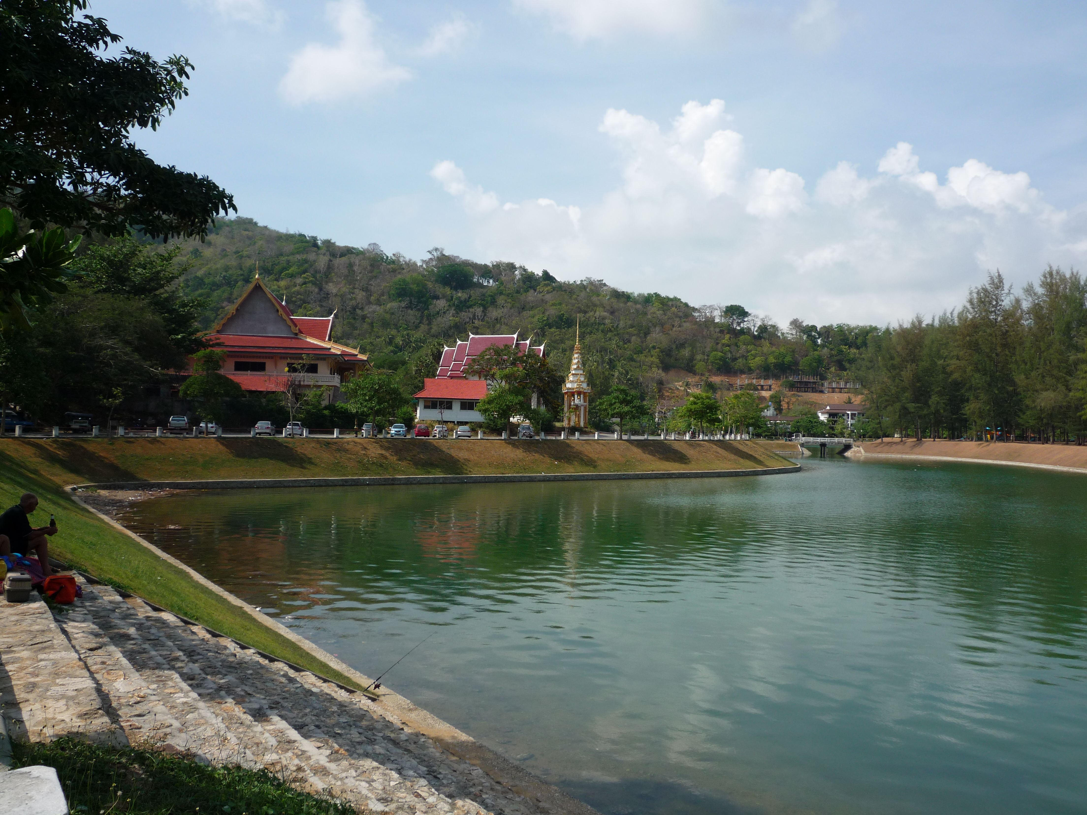 Blick auf Wat Ban Ko Si-Li (วัดบ้านเกาะสิเหร่), auch Wat Ko Si-Li (วัดเกาะสิเหร่) oder Wat Ko Si Ri genannt, Nai Harn Beach, Phuket, Thailand